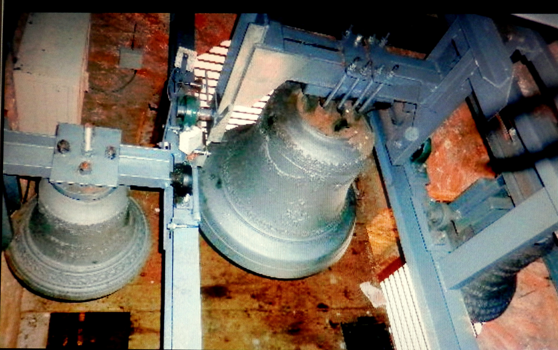 Obec Sedlice kostolné zvony: vľavo zvon Ružencovej Panny Márie z roku 1924, v strede sv. Michala Archanjela z roku 1824, vpravo sv. Cyrila a Metoda z roku 1924. Kostol Premenenia Pána.